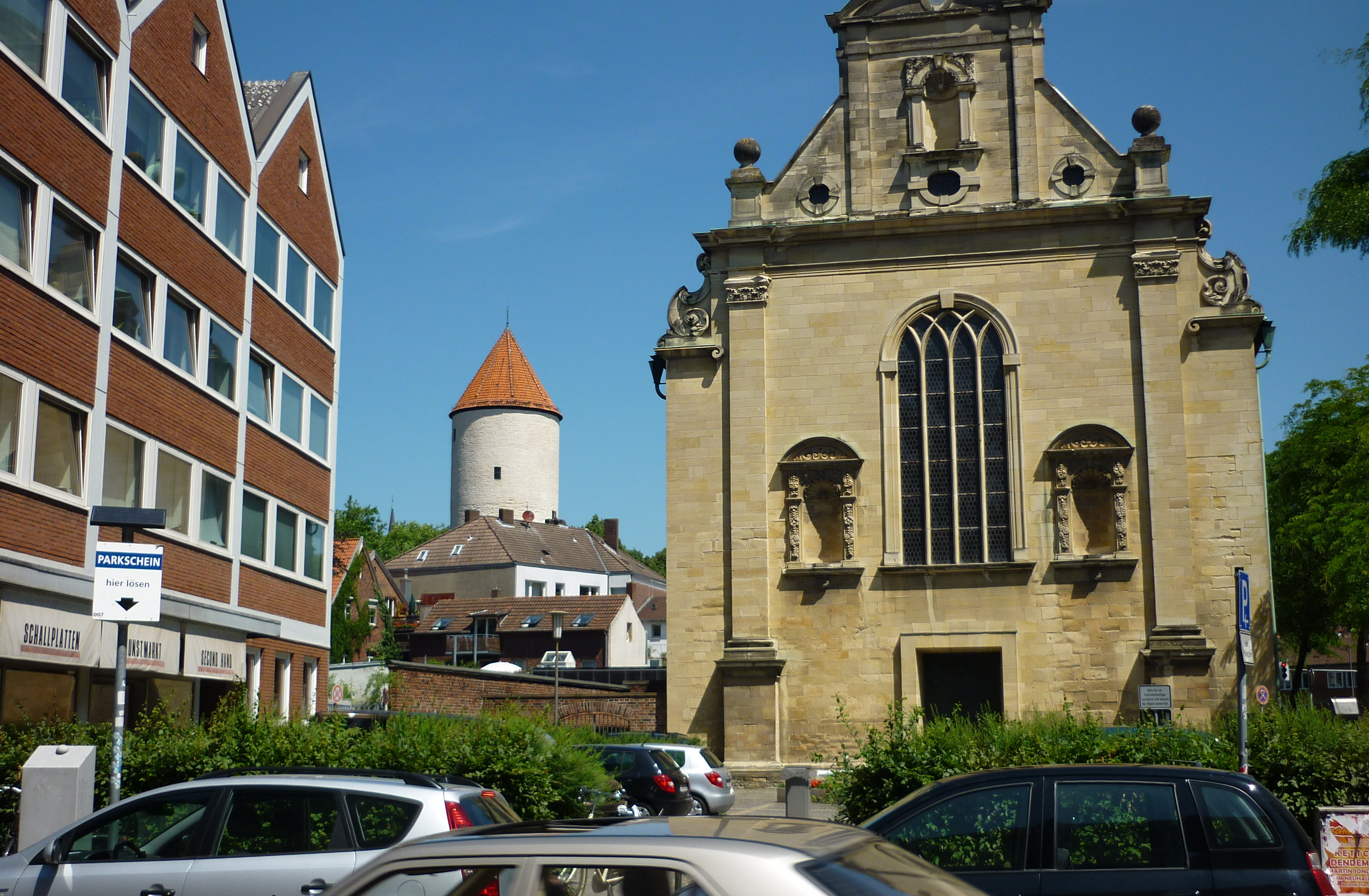 Münster (Westfalen). Universitätskirche in der Rosenstraße mit Blick zum Buddenturm.